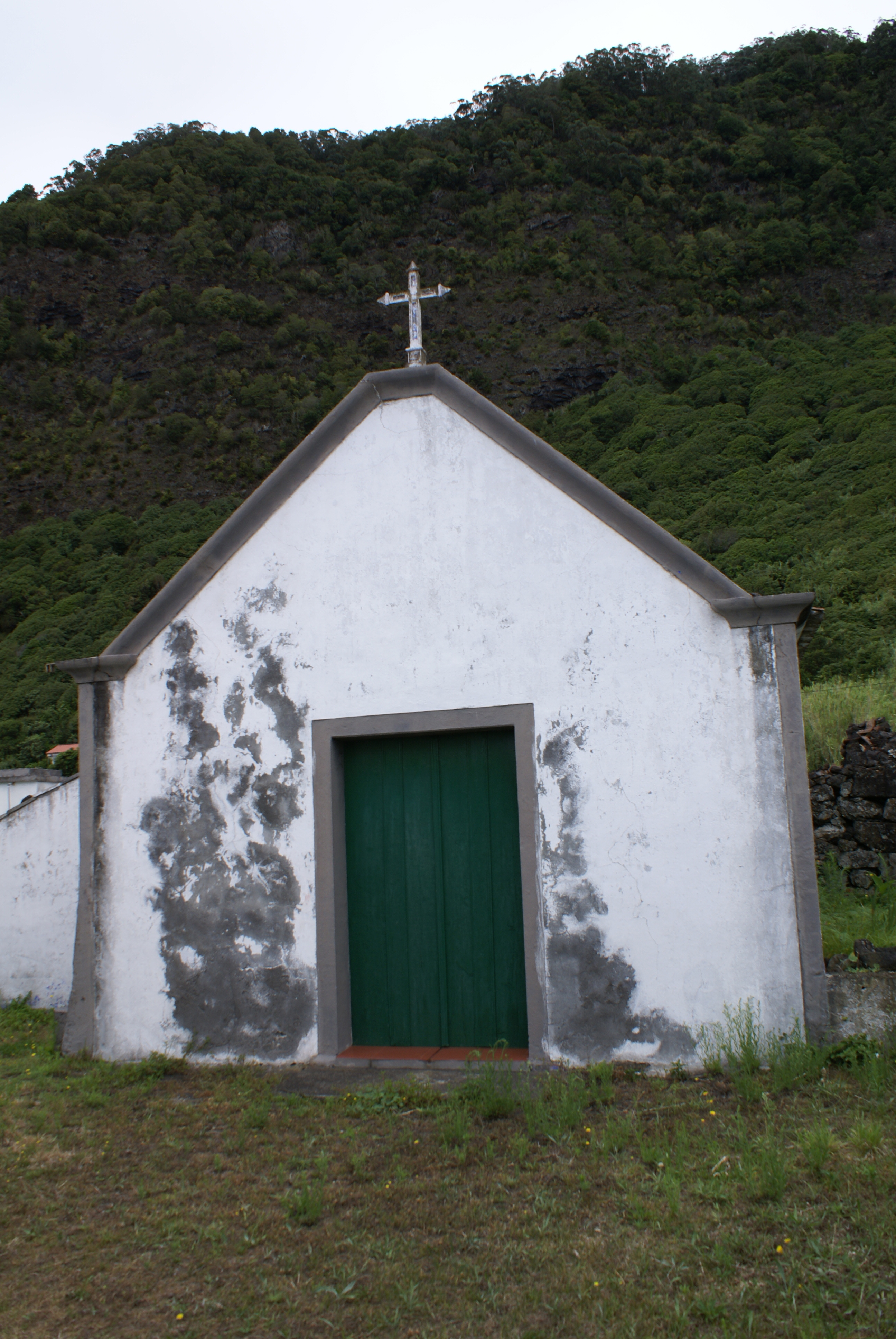 Ermida de Nossa Senhora das Almas, lugar do Barbos, Fajã das Almas, Manadas, Velas, ilha de São Jorge, Açores